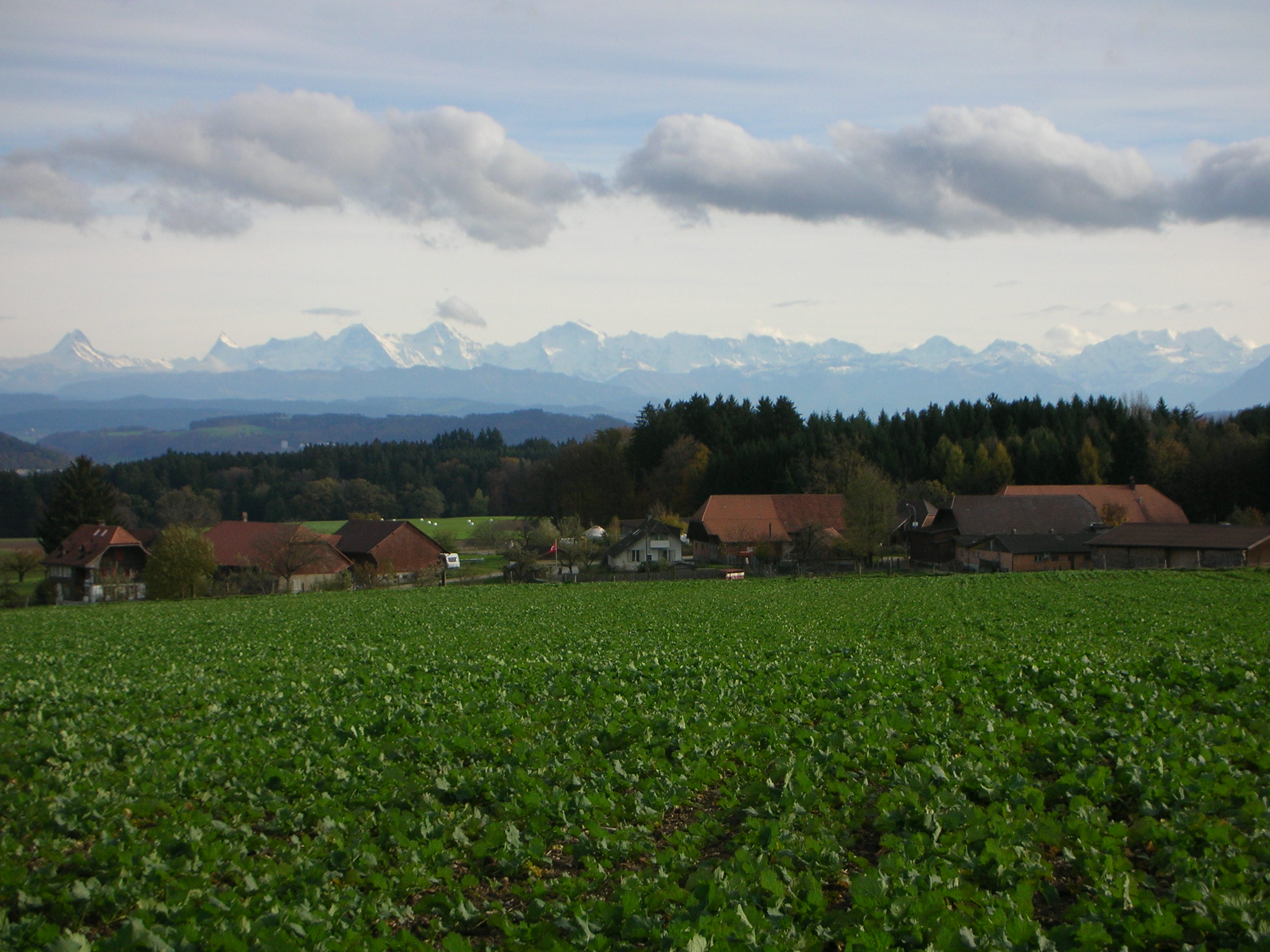 Der Weiler Ufem Moos in der Gemeinde Diemerswil (Kt. Bern / Schweiz) von Norden gesehen. Im Hintergrund Berner Oberland.